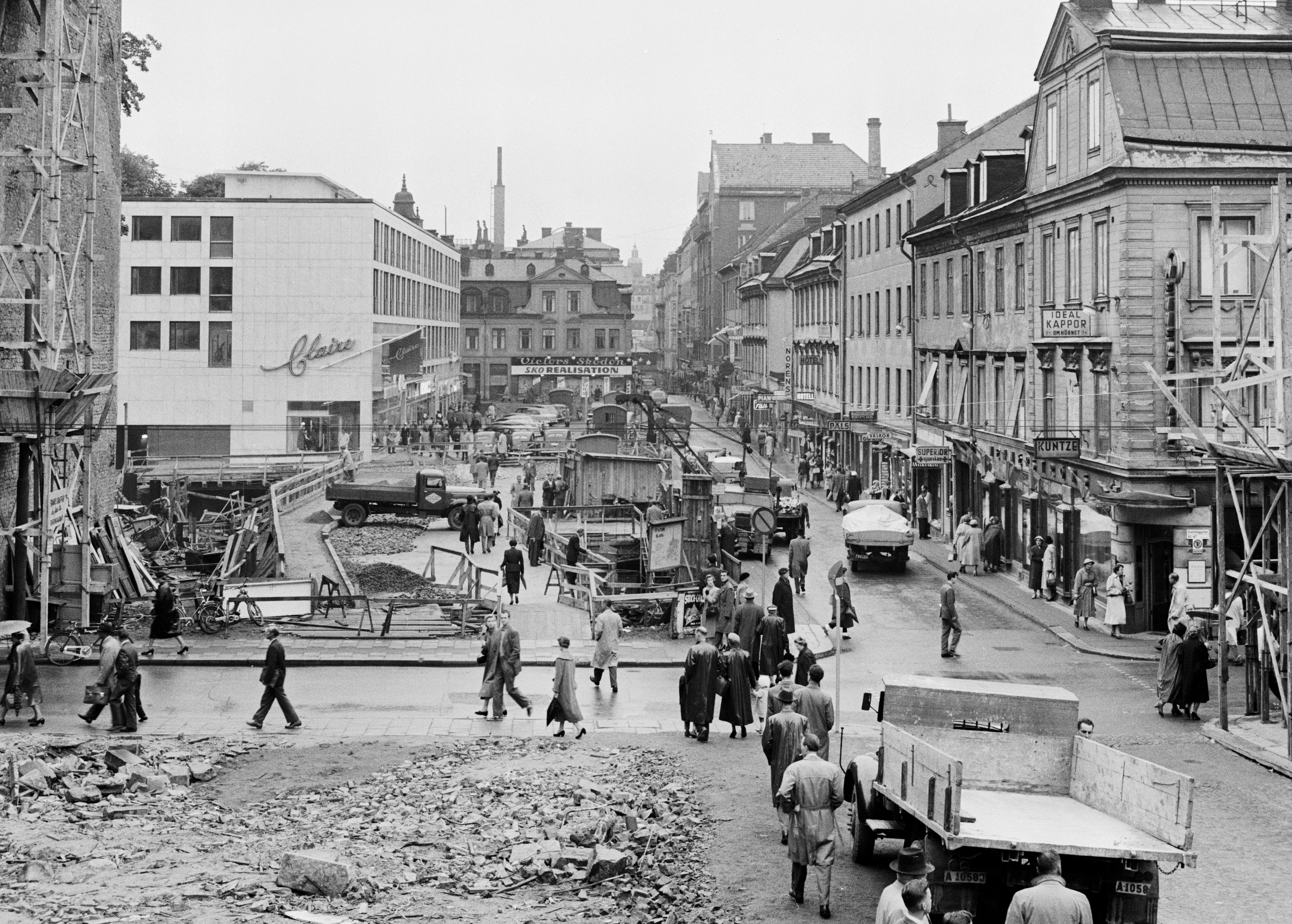 Korsningen Drottninggatan/Klarabergsgatan västerut. Rivningar av kvarteret Hägern Större. Klarabergsgatan breddas och samtliga fastigheter rivs. Claire på Klarabergsgatan 33, ligger i nybyggda "Orgelpipan", arkitekt Lennart Tamm.